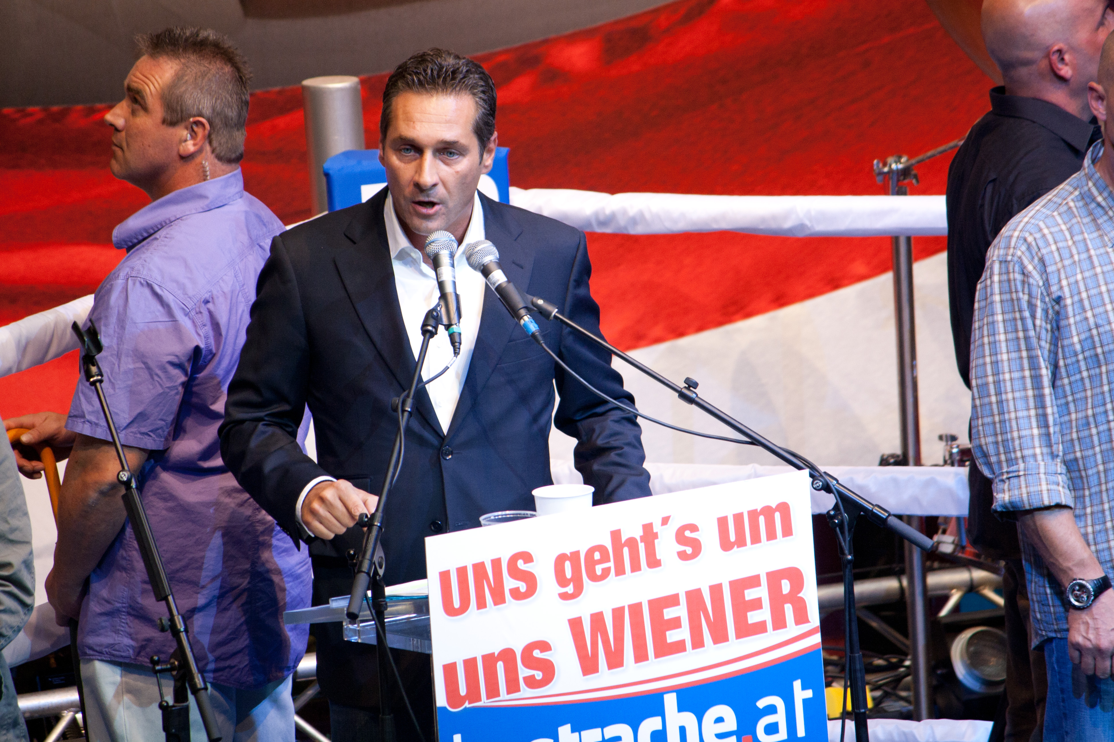 Heinz-Christian Strache beim Wiener Wahlkampfauftakt der FPÖ in der Lugner City